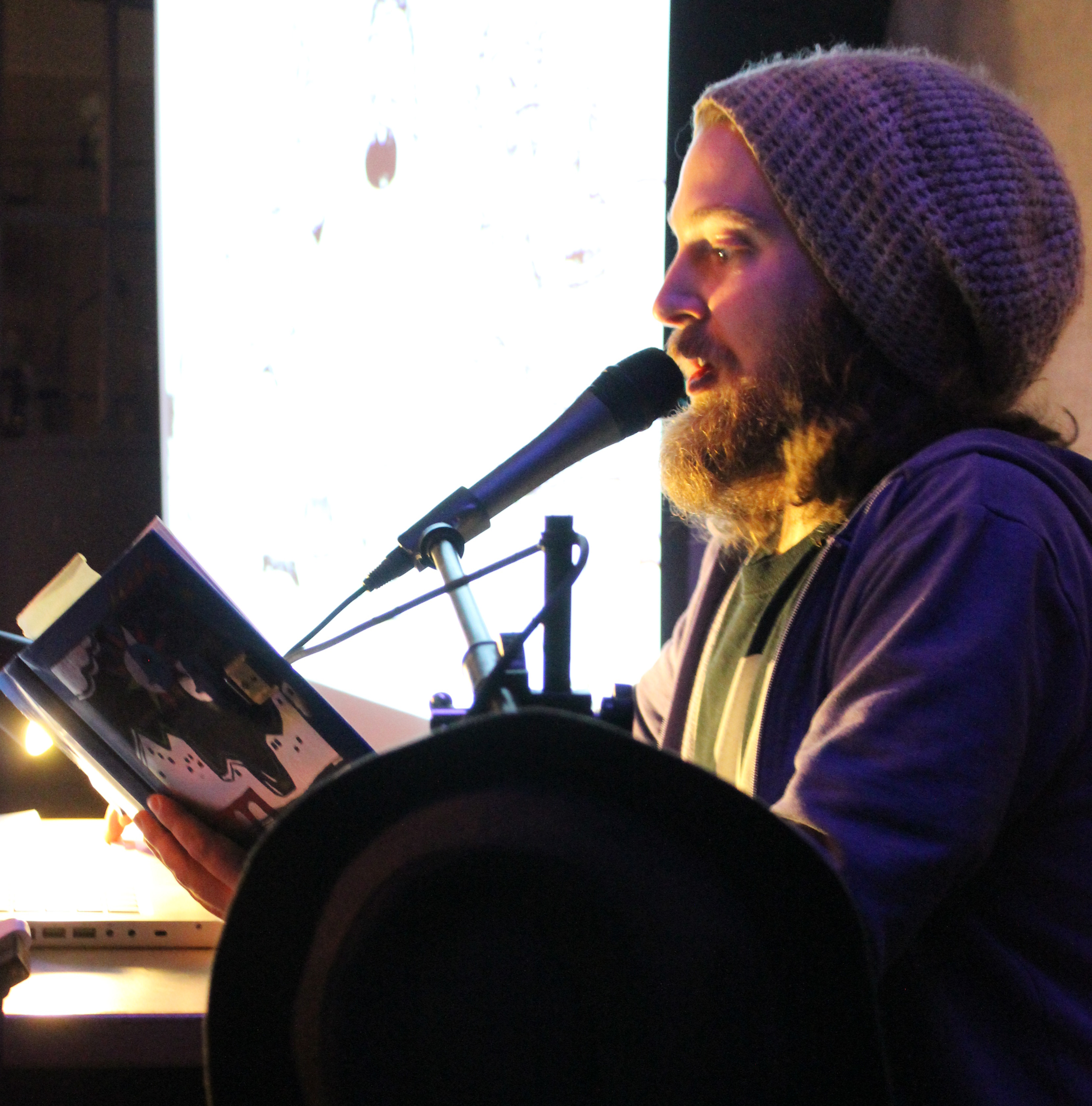 Liveauftritt